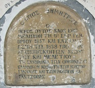 Ктиторски надпис в църквата "Свети Димитър" в Костурени